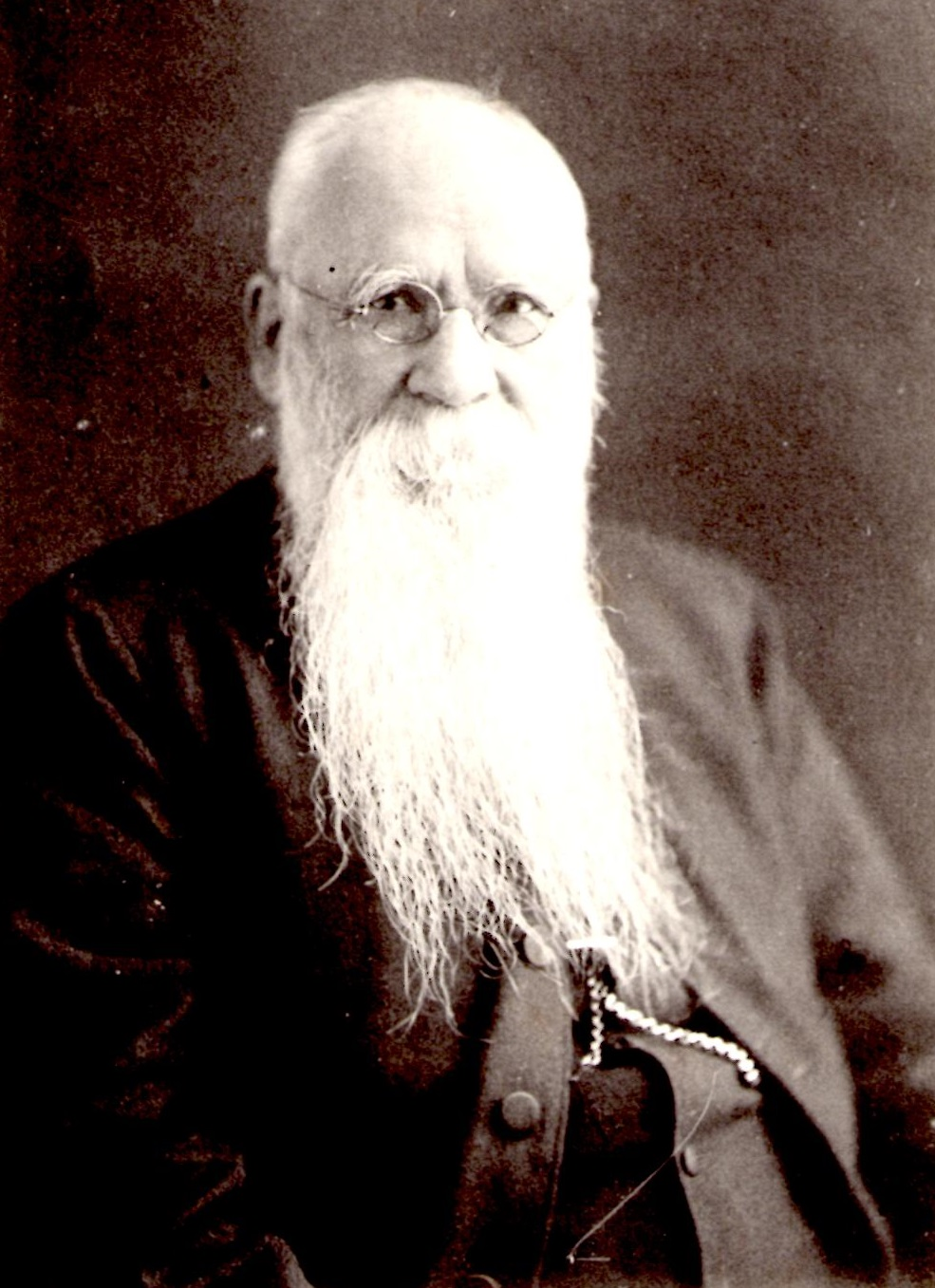 昭和3年刊行『我が記憶をたどりて』より。